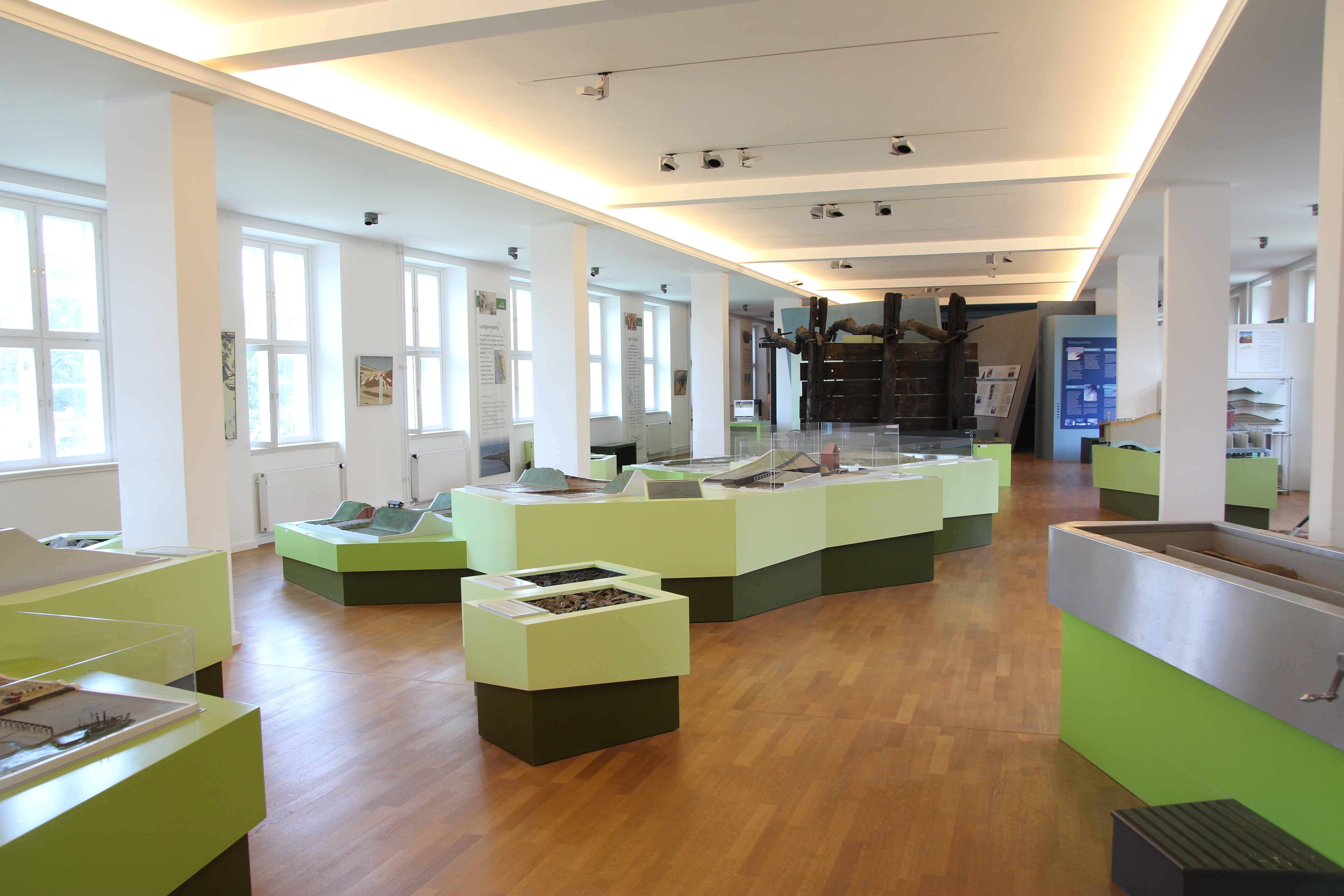 NordseeMuseum Husum (Nissen-Haus).